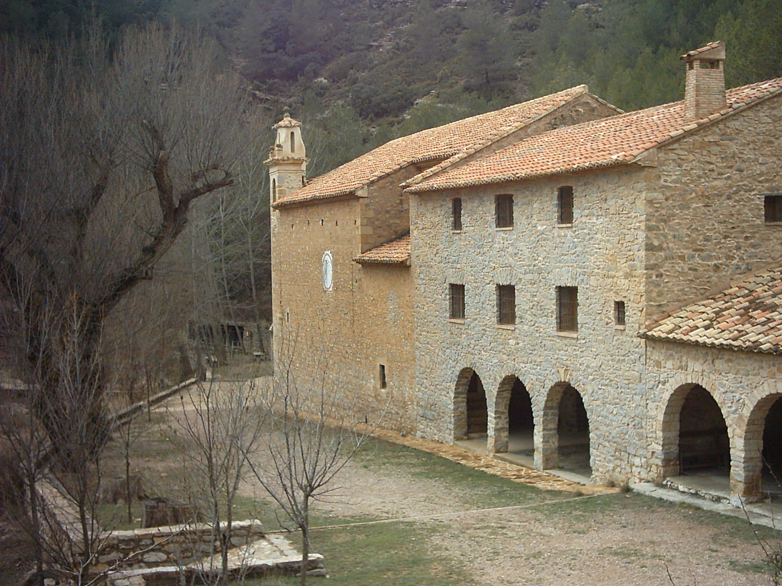 Ermita de Santa Anna (Sucaina) 08.142-003.